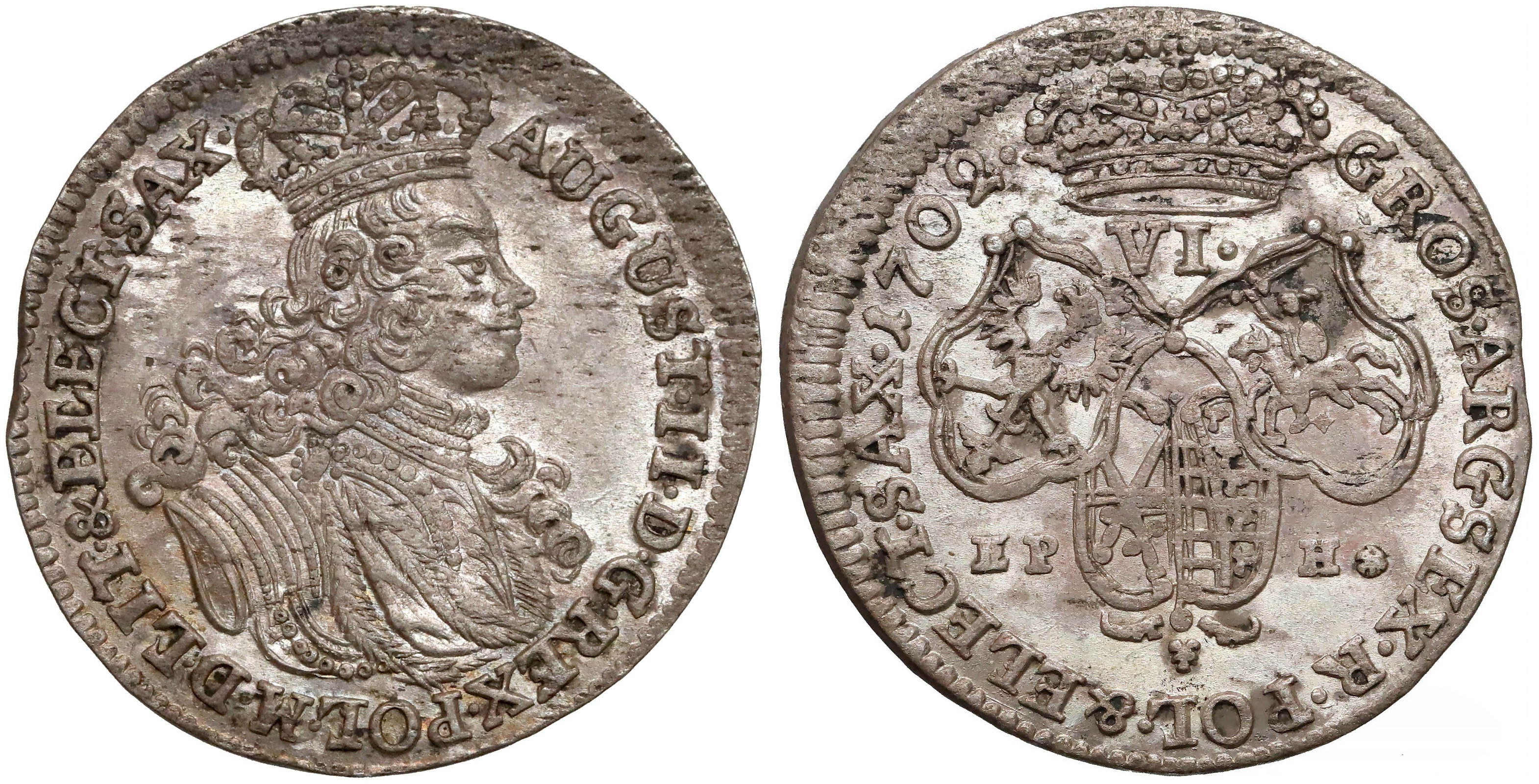 Szóstak koronny 1702 Lipsk